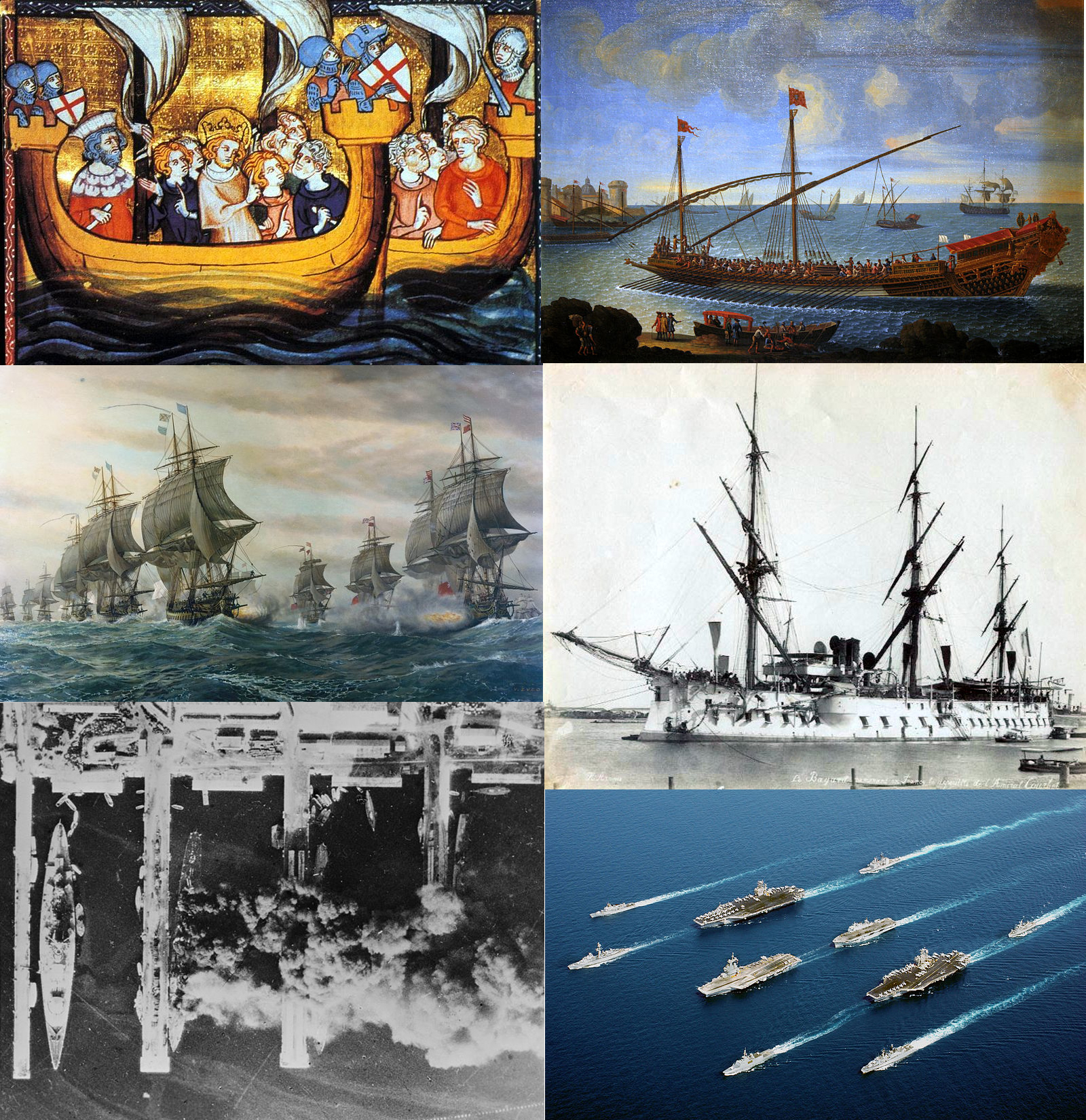 Image illustrant l'évolution de la marine française : Saint-Louis partant pour la septième croisade, une galère sortant de l'Arsenal de Marseille au début du XVIIème siècle, bataille de la baie de Chesapeake pendant la guerre d'indépendance des Etats-Unis, le passage de la voile à la vapeur, le sabordage de la flotte française à Toulon en 1942, et le porte-avions Charles de Gaulle aux côtés de bâtiments alliés dans le cadre de l'OTAN.